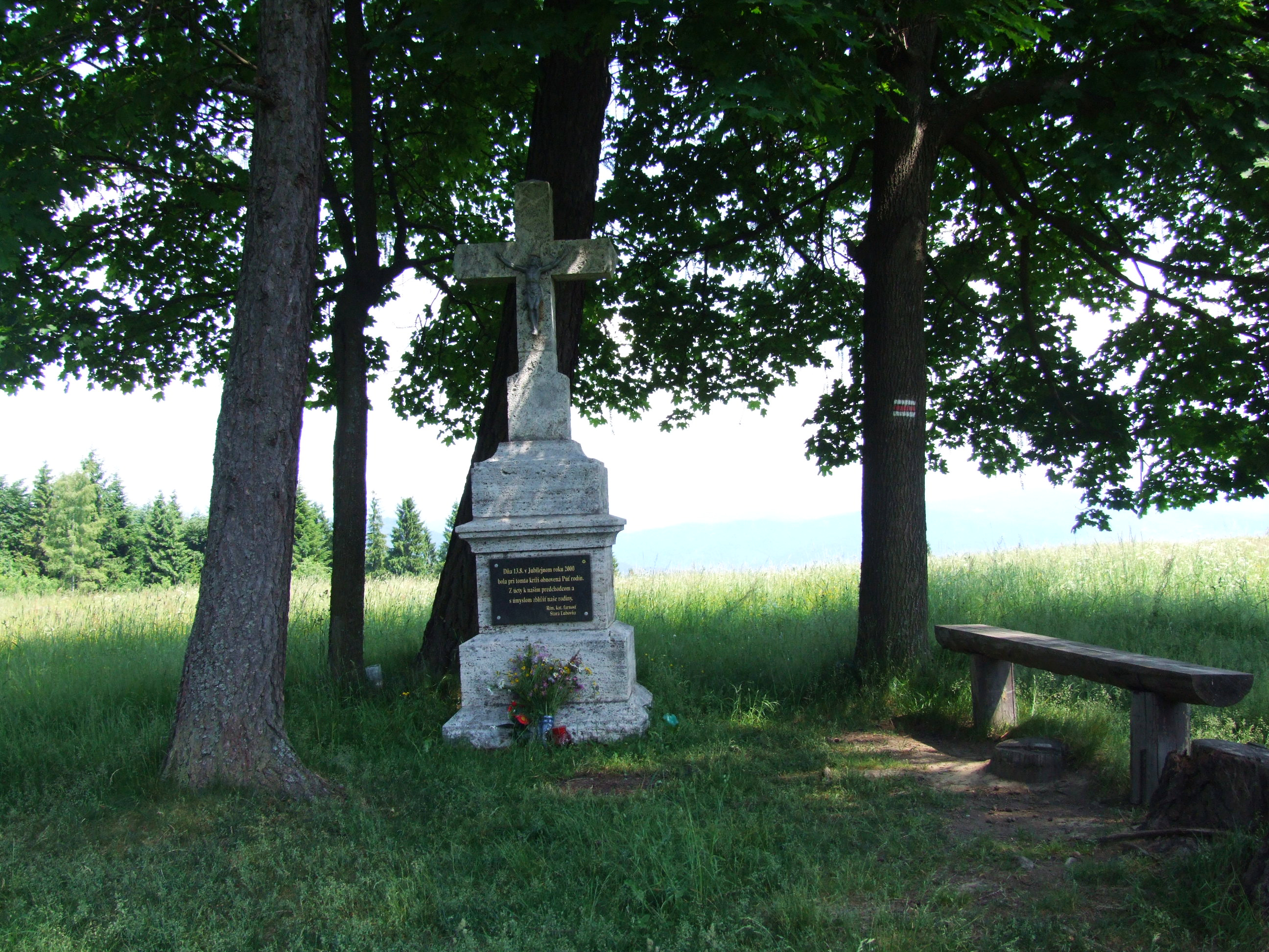 Krzyż katolicki na szczycie Oślego Wierchu